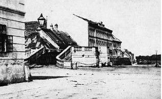 Seltene Aufnahme (vor 1870) aus dem Fotoatelier E. Kozics (Archiv des Karpatendeutschen Kulturwerkes Karlsruhe)